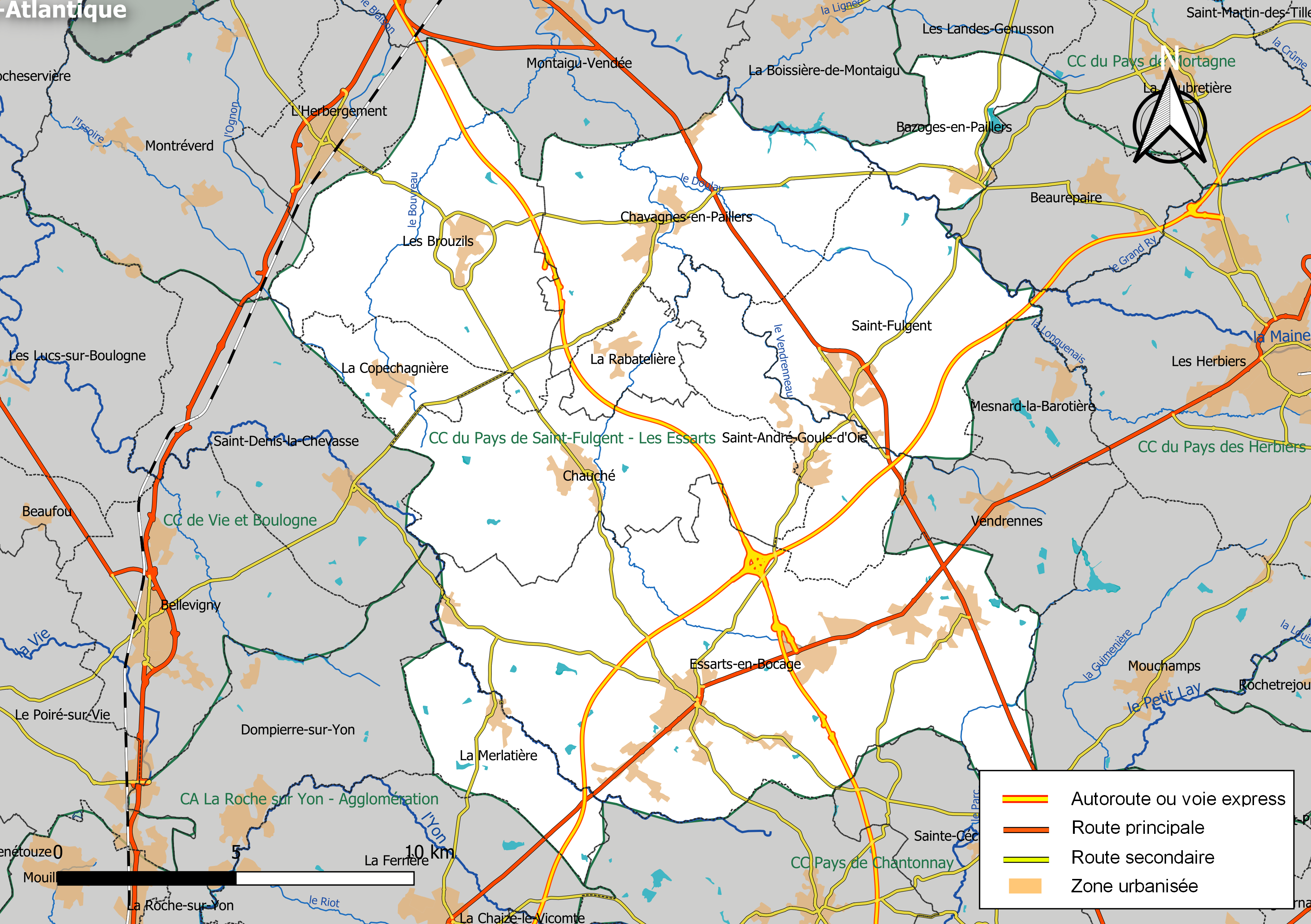 Carte géographique de la Communauté de communes du Pays de Saint-Fulgent - Les Essarts, département de la Vendée, France. Composition au 1er janvier 2019.